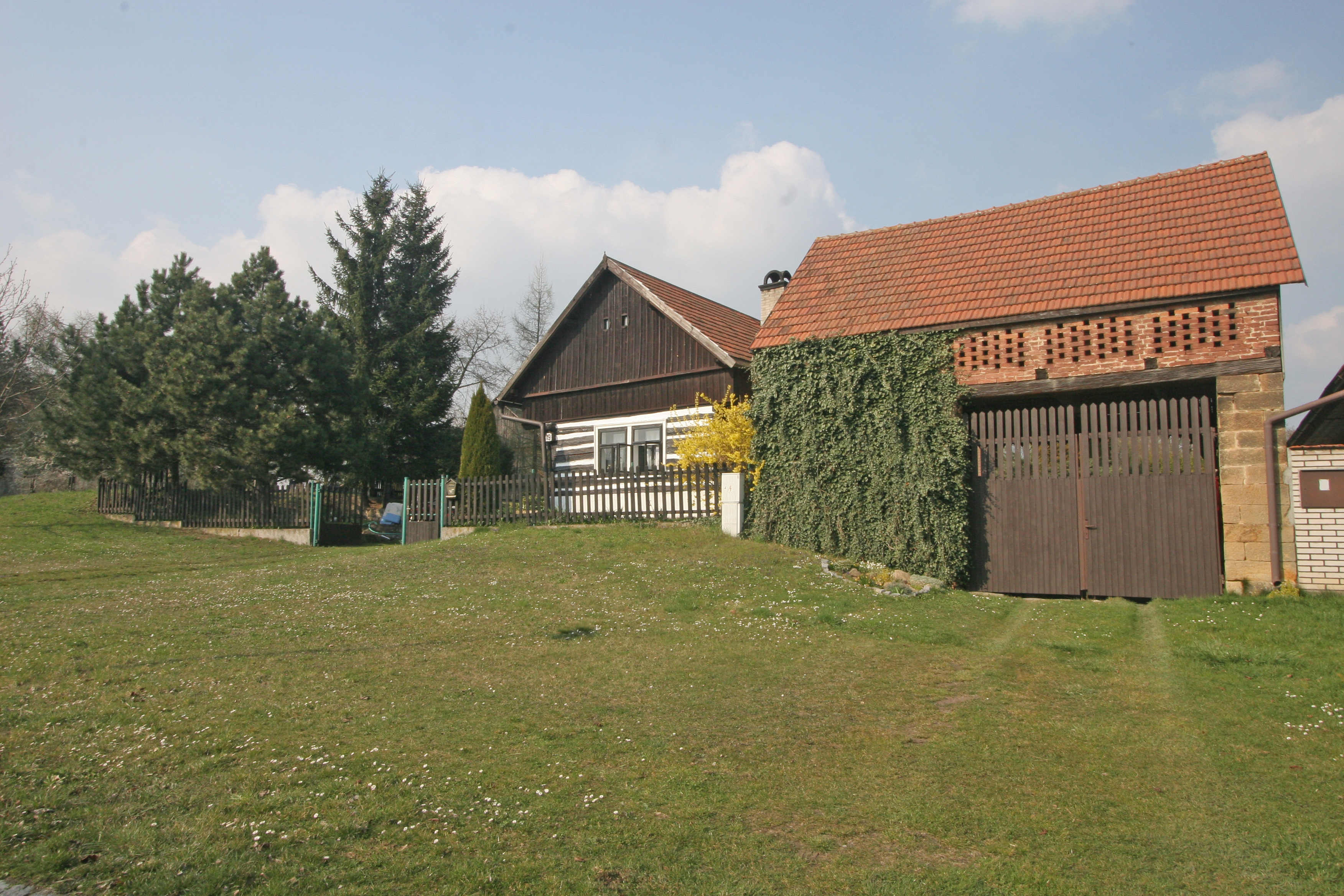 Domoslavice čp. 19